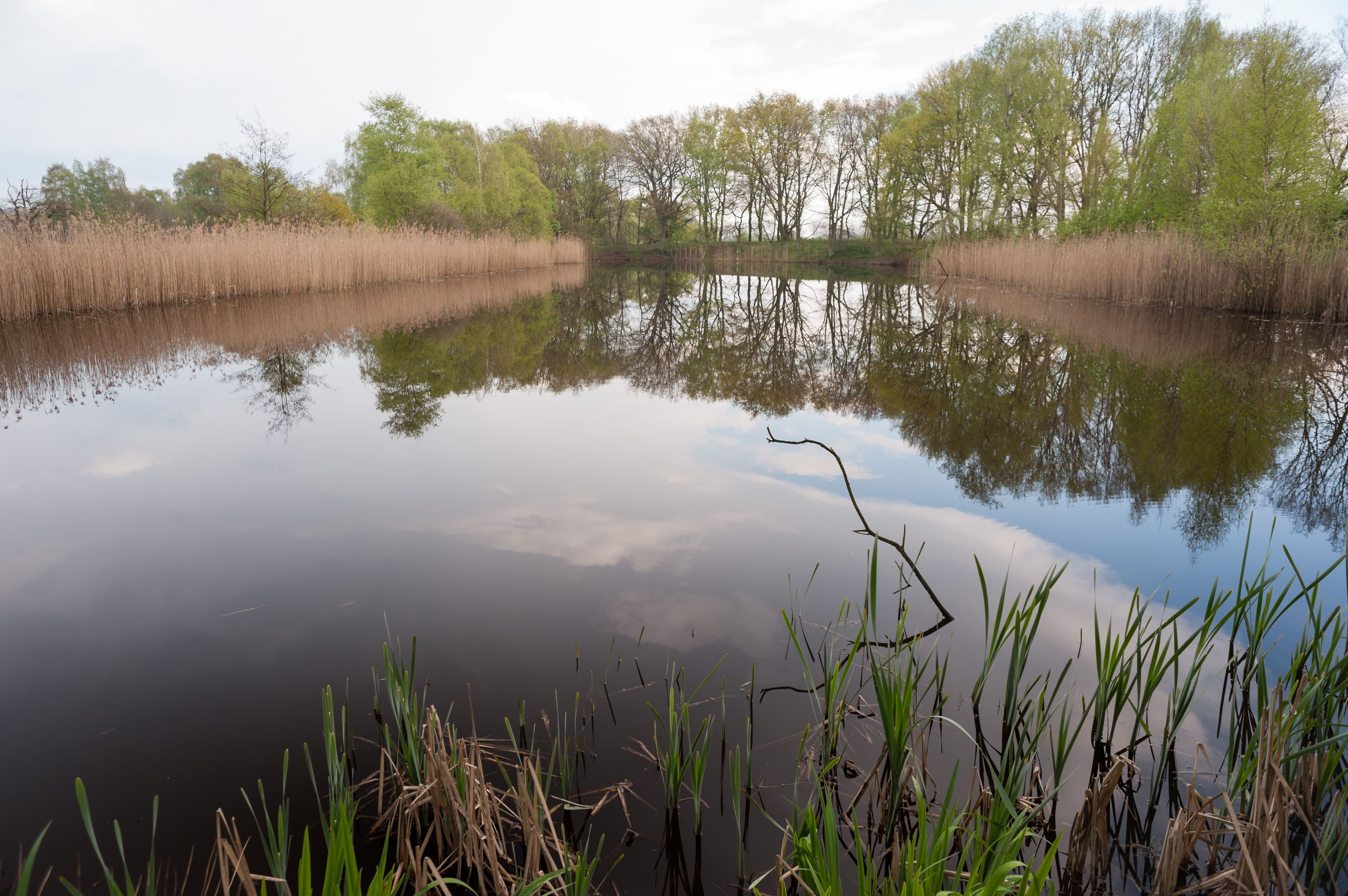 Der Haarteich im NSG „Boberger Niederung“, Hamburg. Lebensraum der Kreuzkröte.